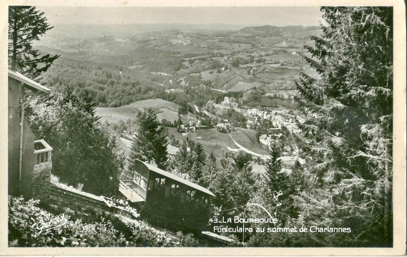 Carte postale ancienne éditée par G d'O, n°43 : LA BOURBOULE